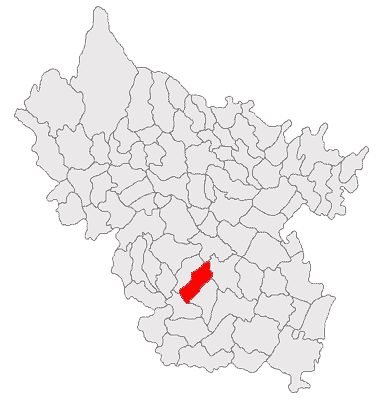 Categorie:Hărţi ale judeţului Buzău